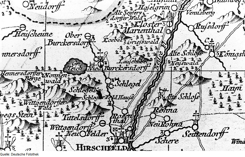 Original image description from the Deutsche Fotothek Hirschfelde-Schlegel-Burkersdorf. Oberlausitzkarte, Schenk, 1759